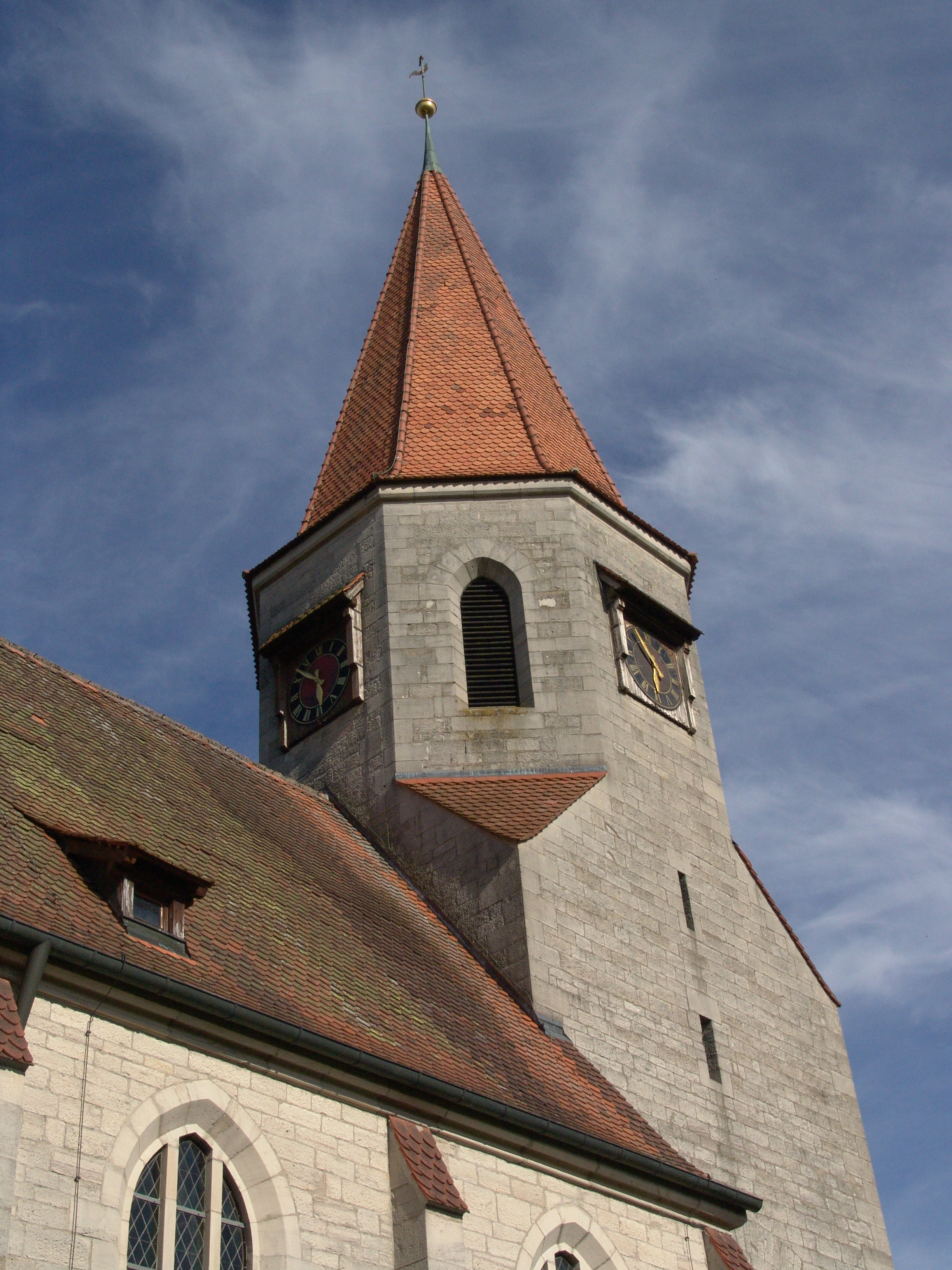 Kirchrimbach Christuskirche